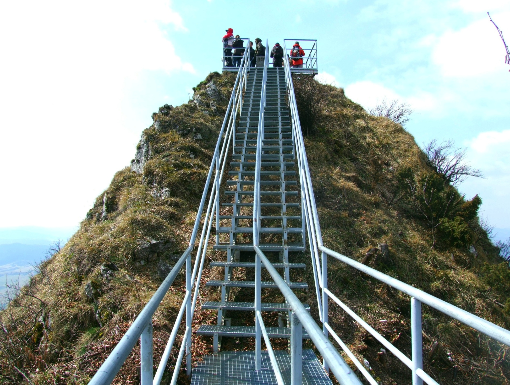 Platforma widokowa na Trzech Koronach